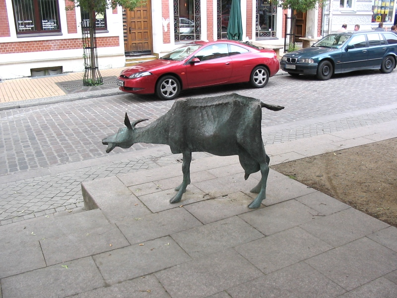 Skulptur auf dem Ziegenmarkt, Schwerin (Germany)